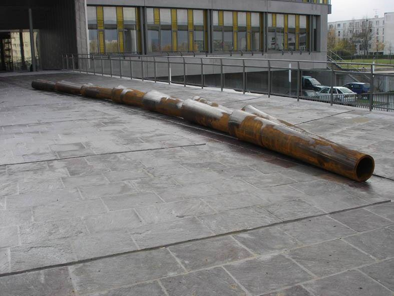 L'oeuvre Chemin d'eau réalisé par Bruno Gaudin